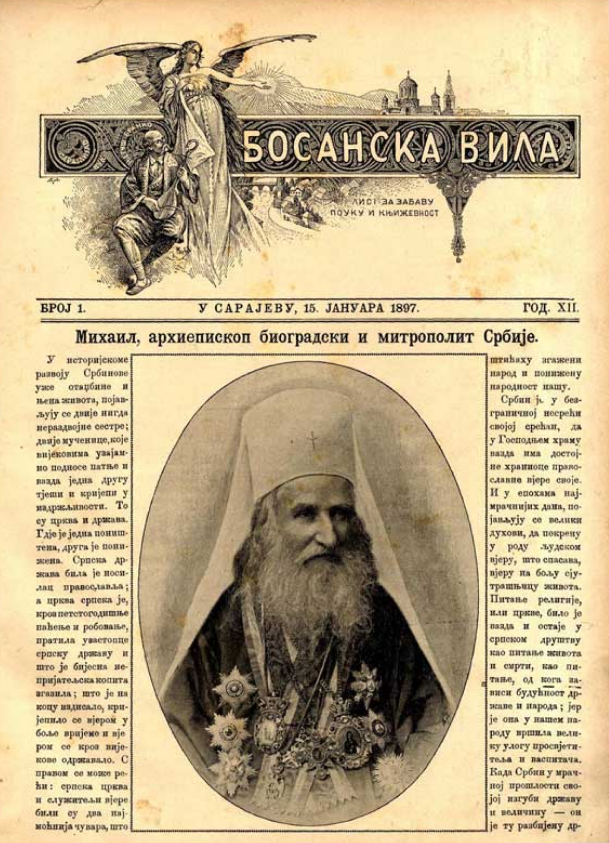 Насловна страна српског часописа Босанска вила објављена 1897. године. Слика је преузета са сајта Слике из српске историје. Licensing This work is in the public domain in its country of origin and other countries and areas where the copyright term is the author's life plus 70 years or less. You must also include a United States public domain tag to indicate why this work is in the public domain in the United States. Note that a few countries have copyright terms longer than 70 years: Mexico has 100 years, Jamaica has 95 years, Colombia has 80 years, and Guatemala and Samoa have 75 years. This image may not be in the public domain in these countries, which moreover do not implement the rule of the shorter term. Côte d'Ivoire has a general copyright term of 99 years and Honduras has 75 years, but they do implement the rule of the shorter term. Copyright may extend on works created by French who died for France in World War II (more information), Russians who served in the Eastern Front of World War II (known as the Great Patriotic War in Russia) and posthumously rehabilitated victims of Soviet repressions (more information). This file has been identified as being free of known restrictions under copyright law, including all related and neighboring rights.